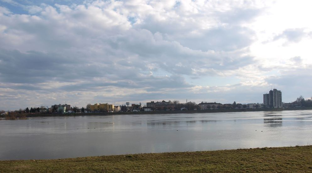 Bosanski Brod slikan iz Slavonskog Broda.